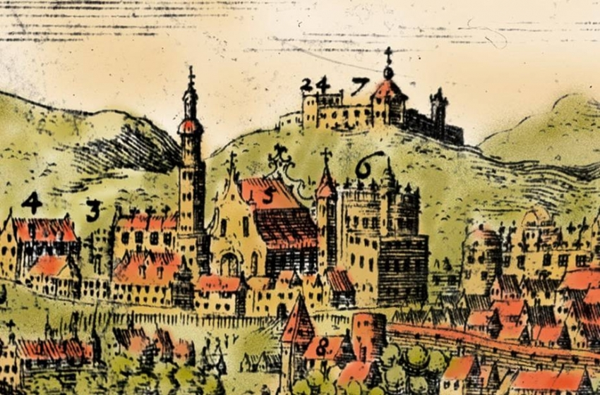 Беларуская (тарашкевіца): Віленскія замкіLatina: Vilna Magni Ducatus Lithuaniae caput